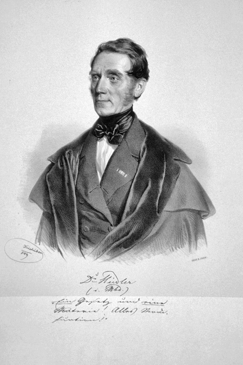 Josef Heidler von Heilborn (1792-1866), Badearzt in Marienbad.